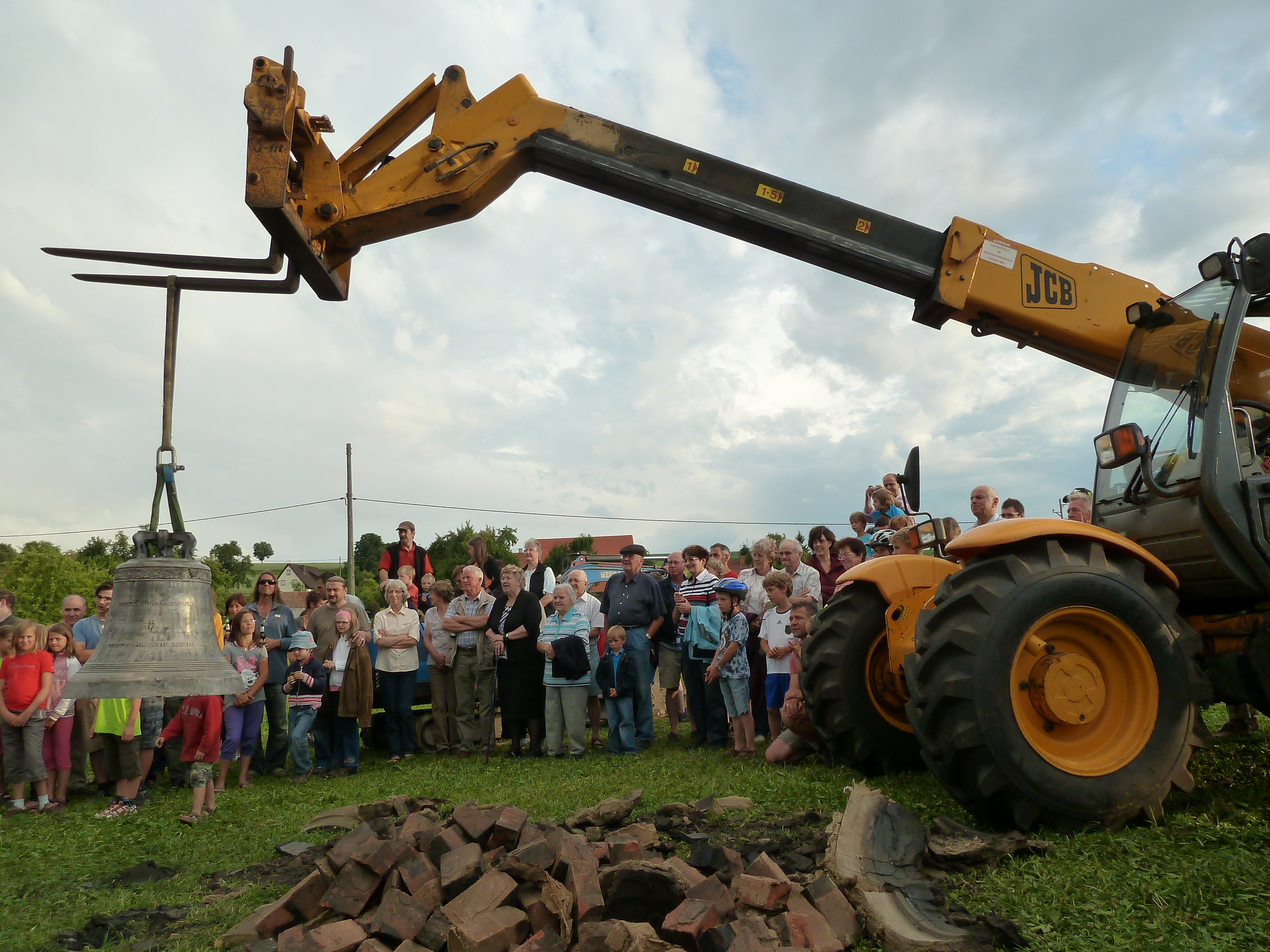 Glockenguss in Ewattingen mit Bruder Michael Reuter von der Abtei Maria Laach